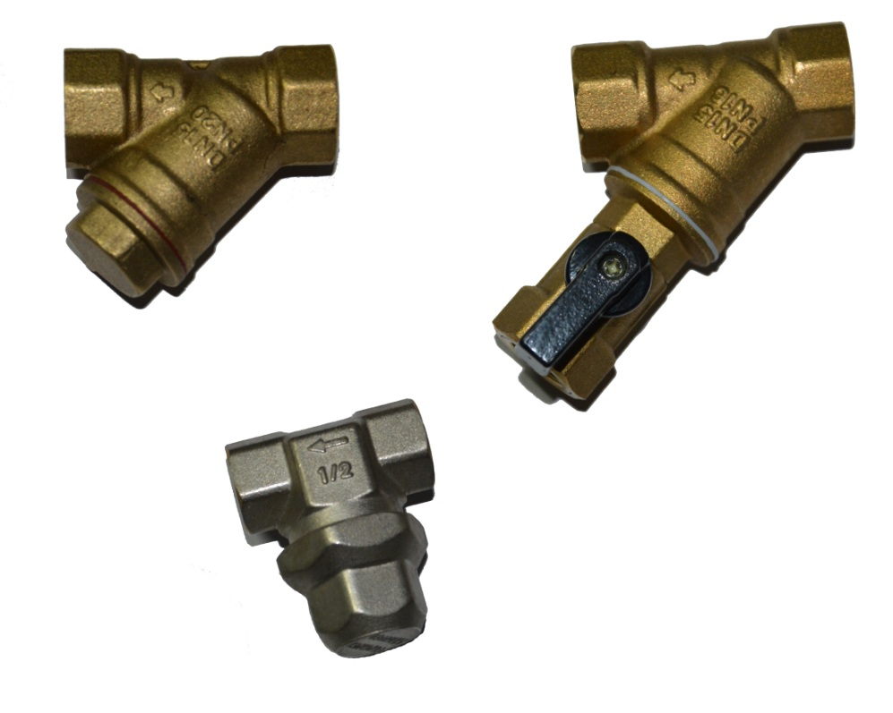 Разновидности фильтров воды